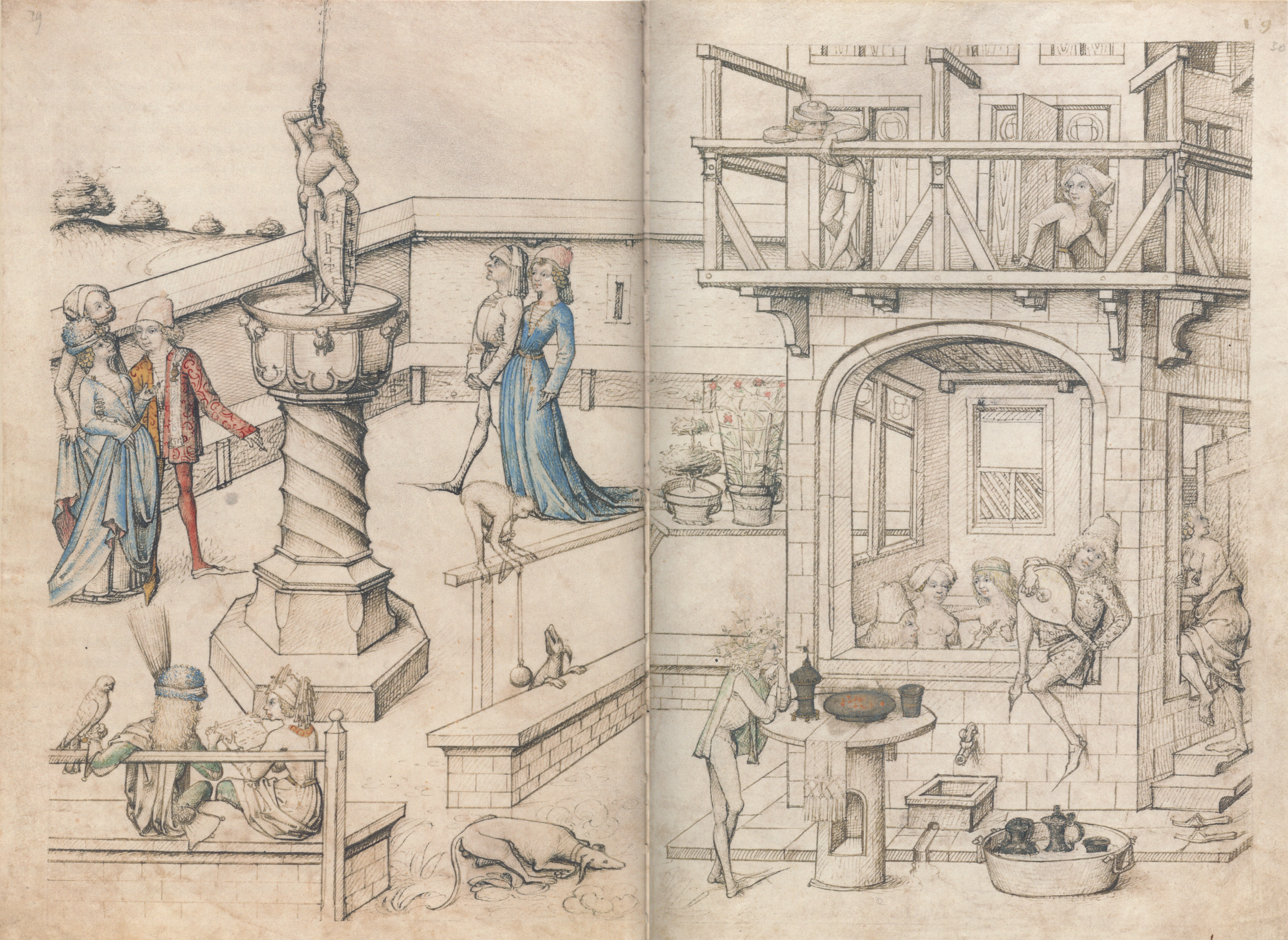 Mittelalterliches Hausbuch von Schloss Wolfegg Doppelseite fol. 18v–19r (Badehaus)